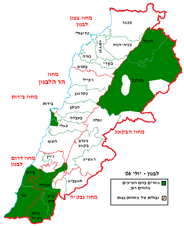 אזורים בלבנון בהם השיעים מהווים רוב